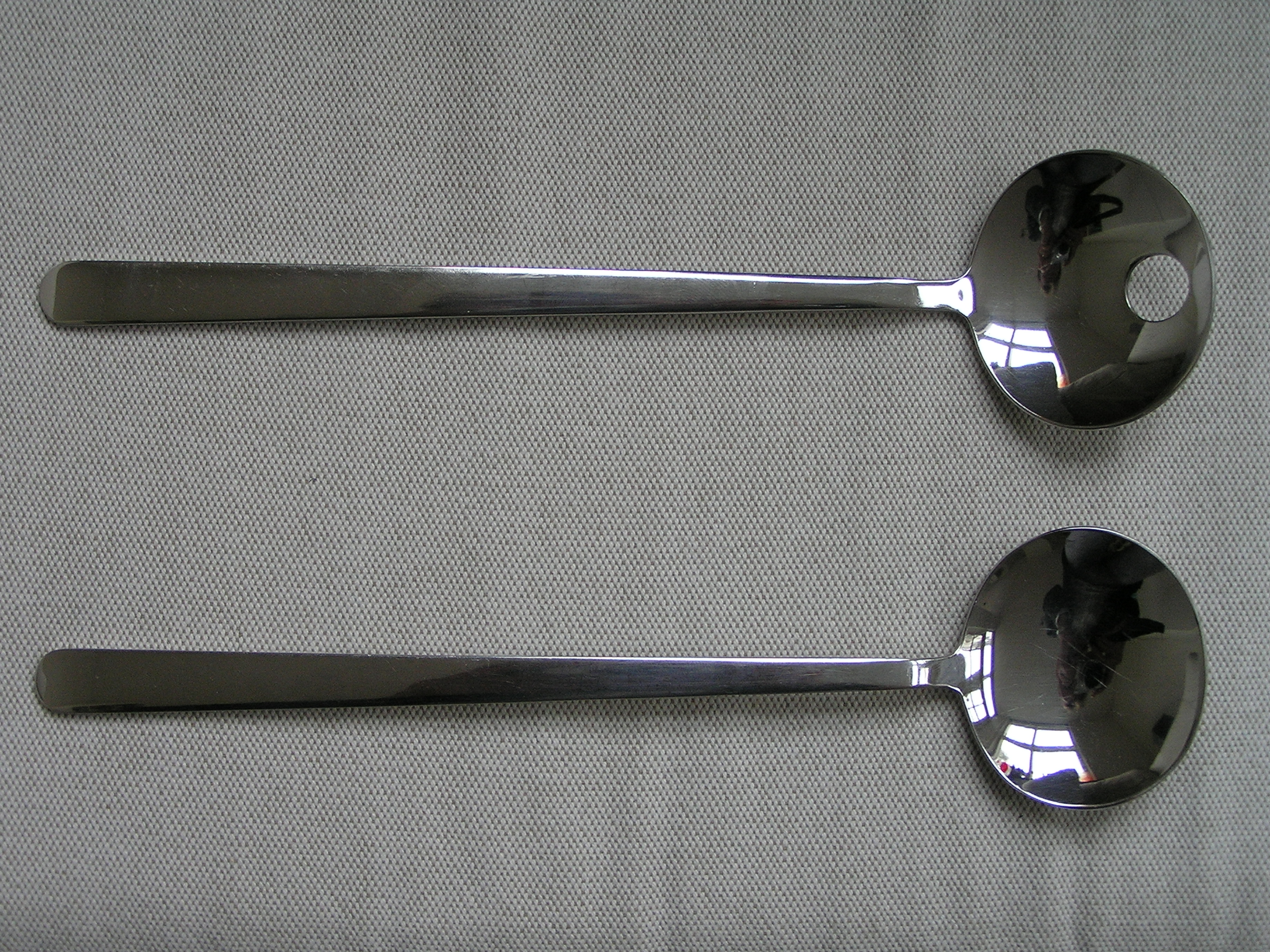 Slacouvert